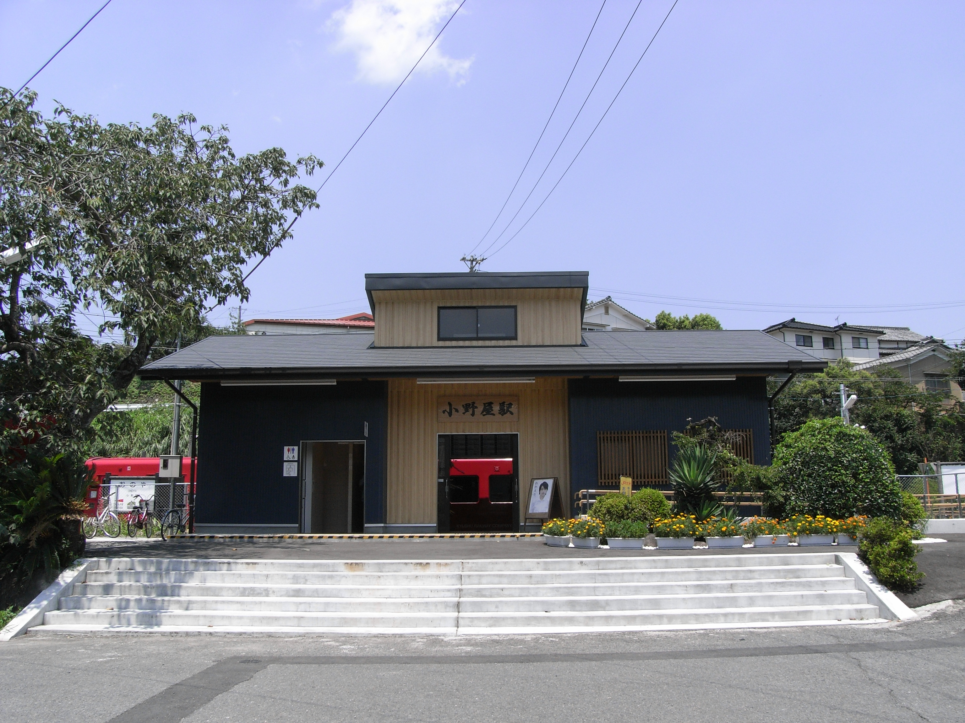 小野屋駅（大分県由布市庄内町東長宝476番地6のJR九州久大本線の駅）